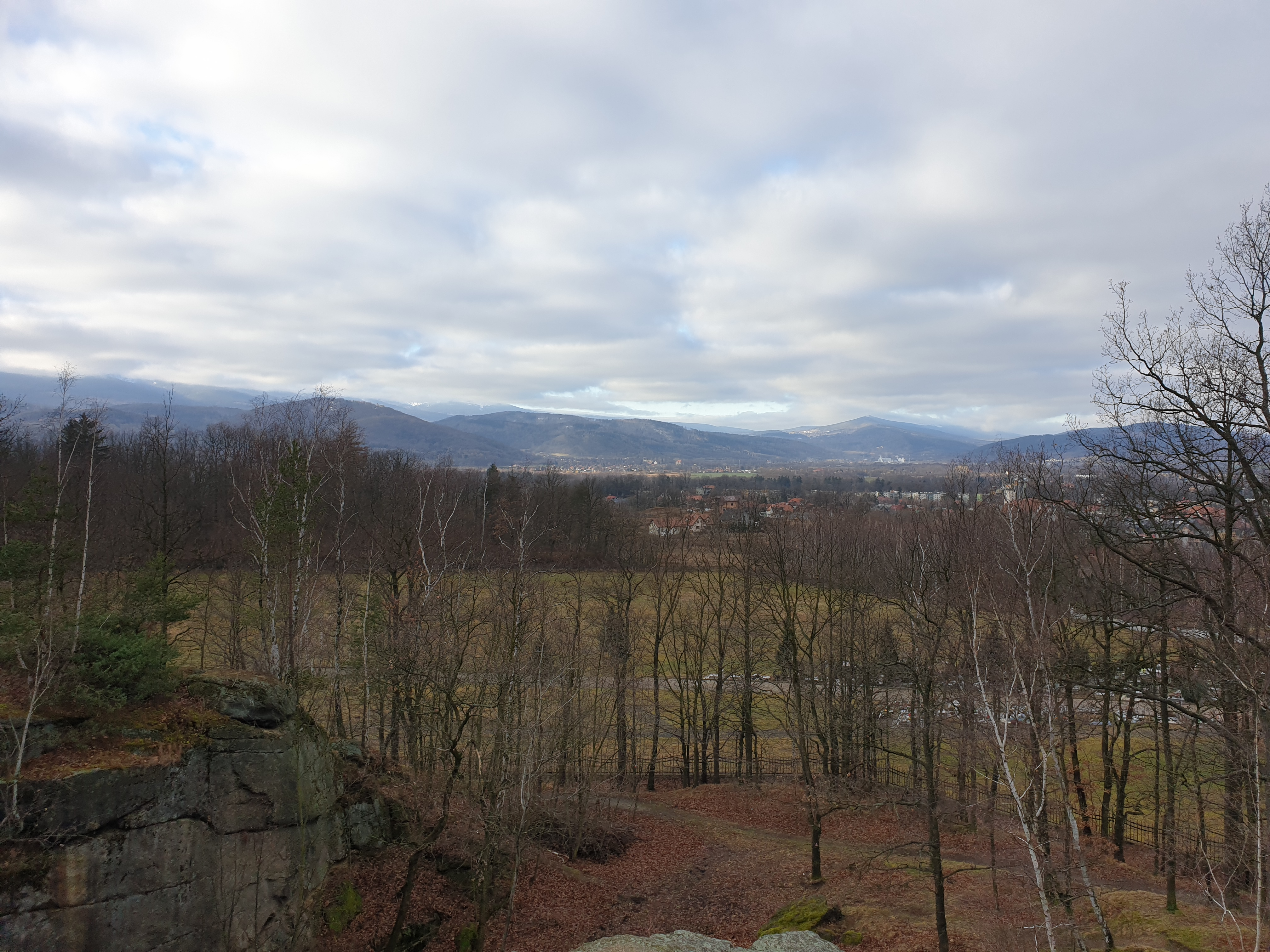 Panorama rozpościerająca się z Morskiego Oka w Cieplicach Śląskich-Zdroju.